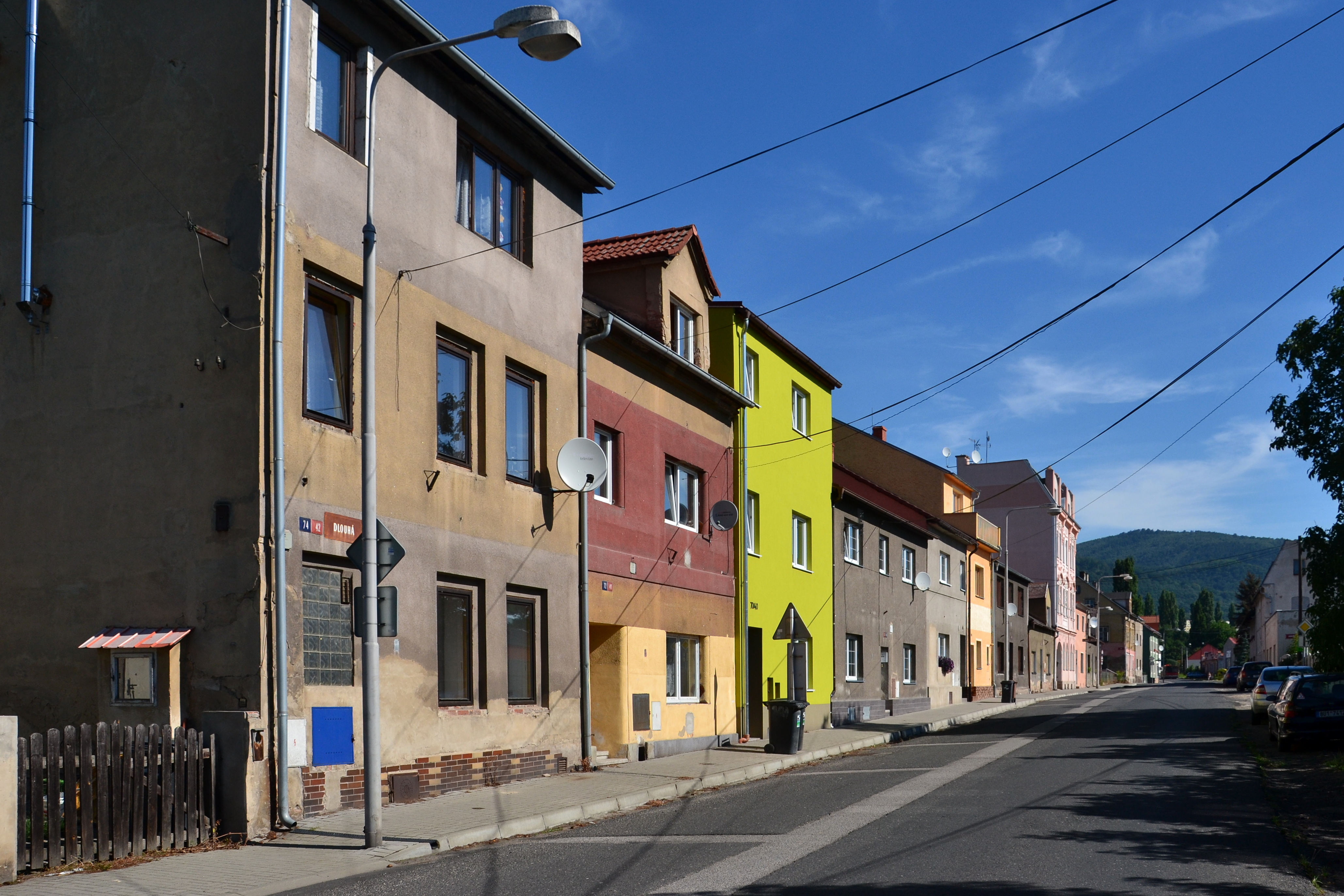 Dlouhá ulice směrem k Bohosudovu